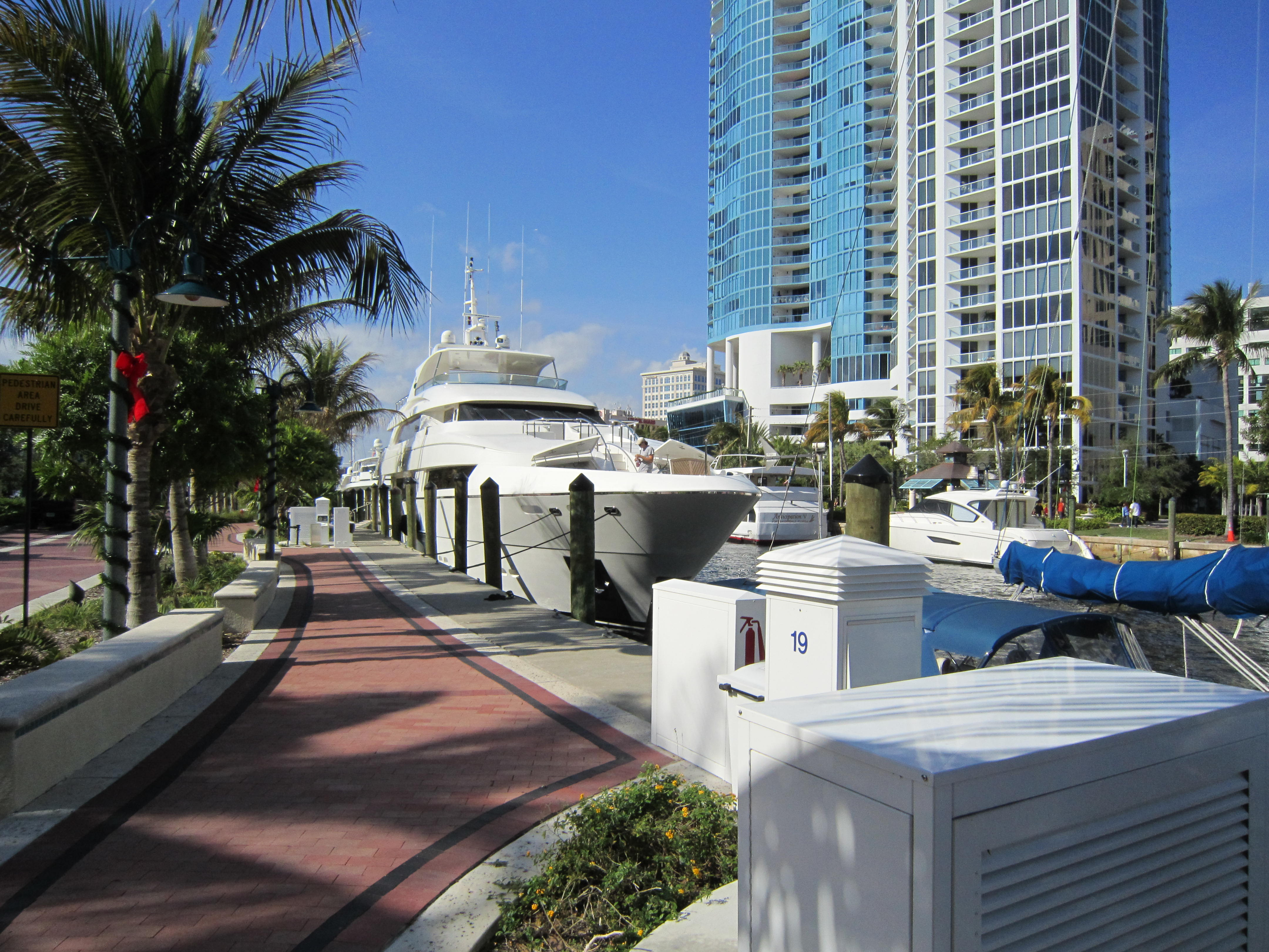 Riverwalk, Fort Lauderdale, Florida,USA.